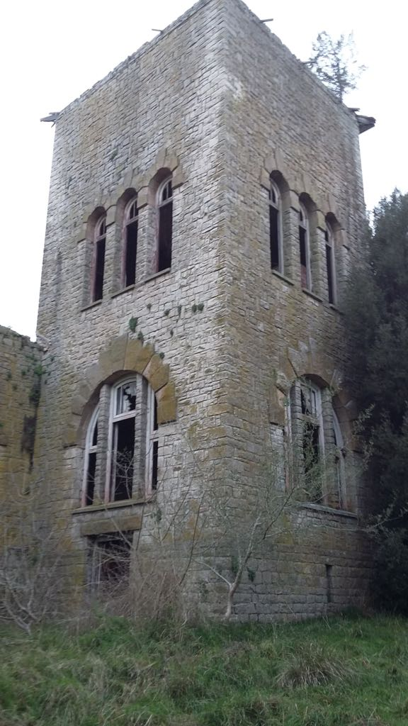 foto exterior de la gran copelina